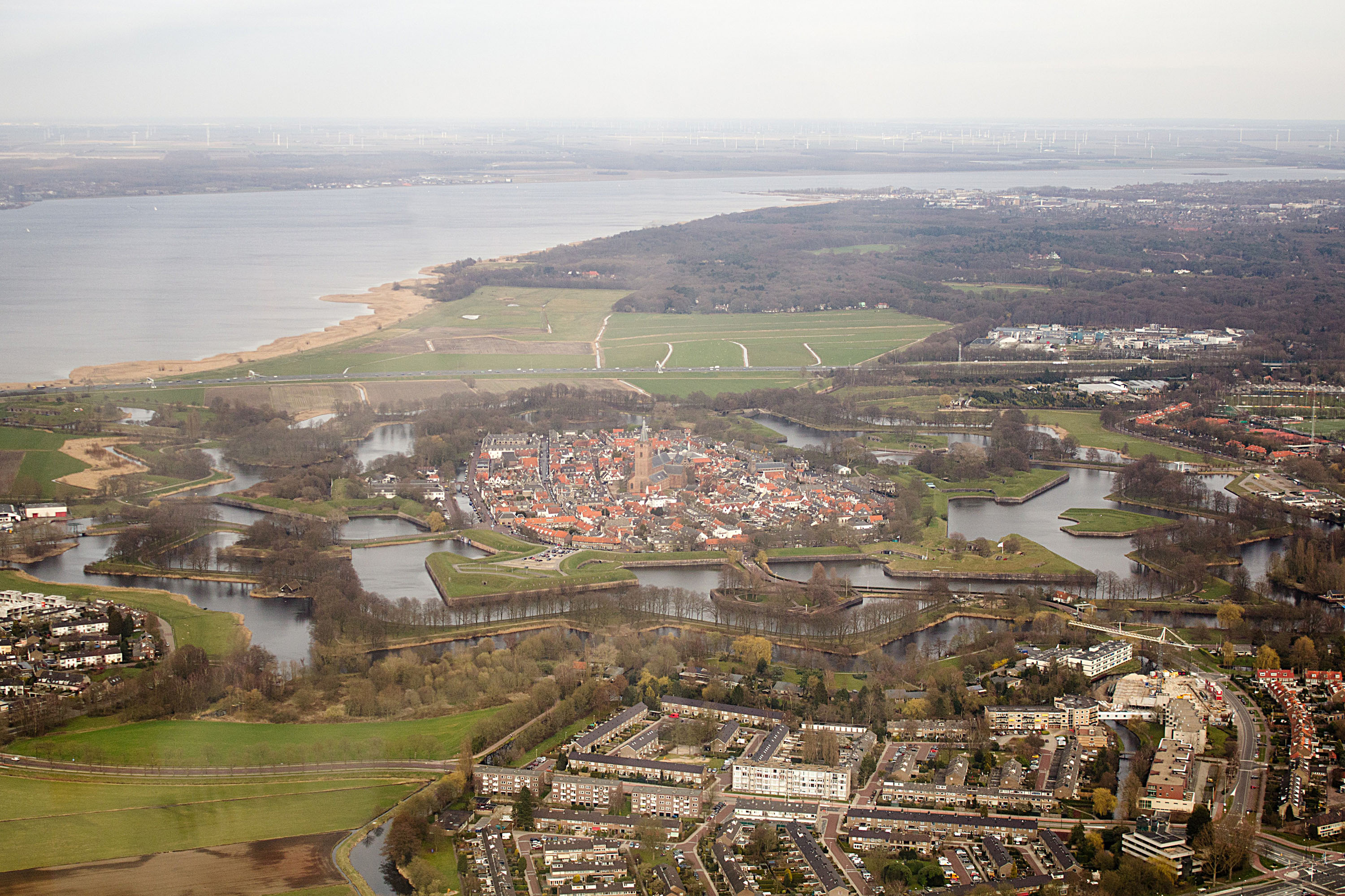 De wallen en Grachten van Naarden. Met dank aan Jeroen Komen.